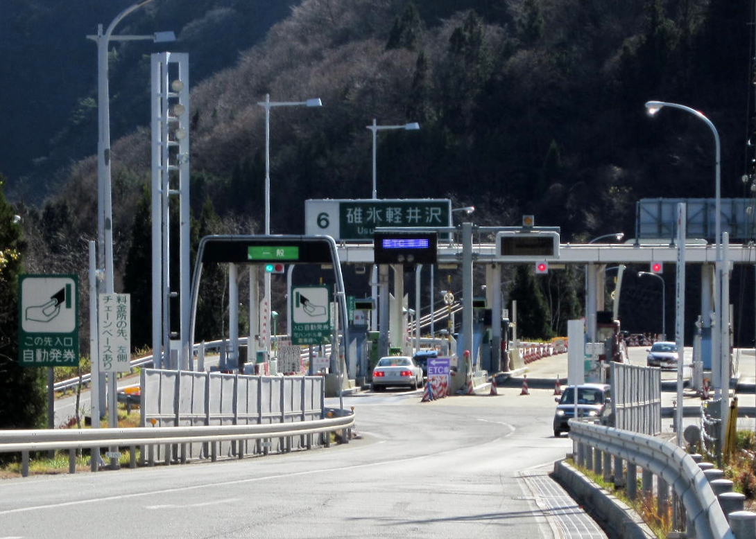 碓氷軽井沢IC（上信越自動車道、群馬県安中市松井田町西野牧）